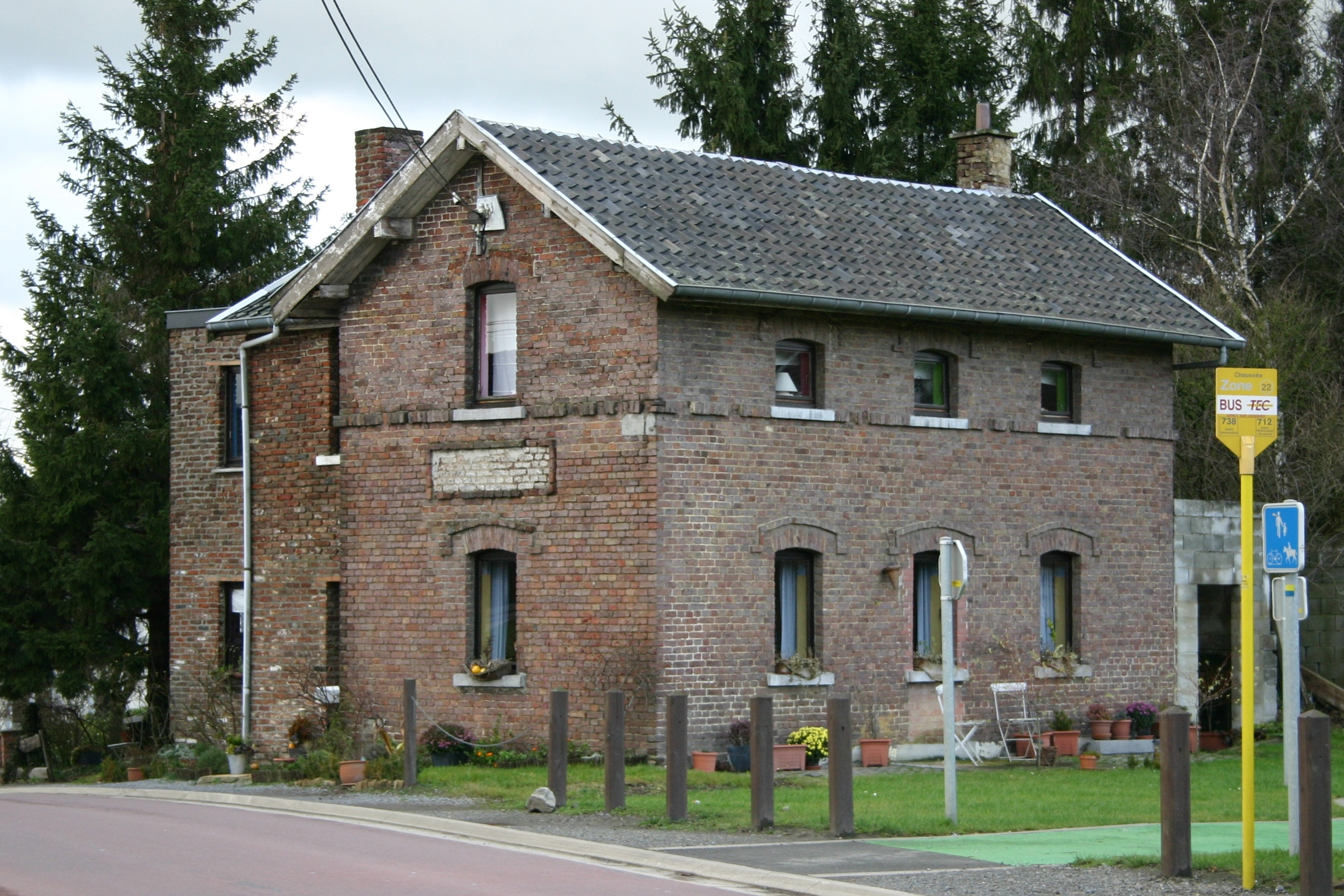 Gare vu Froidthier.